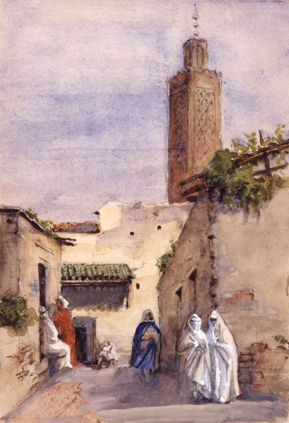 Mosquée Sidi Boumediene en 1886, Tlemcen (Algérie)